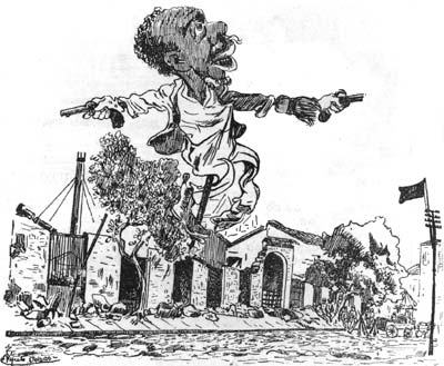 Caricatura de Prata Preta, líder popular da Revolta da Vacina no bairro da Saúde, publicada no periódico O Malho.